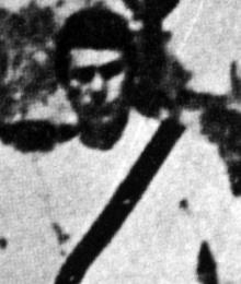 Arthur Johnson, Real Madrid 1902